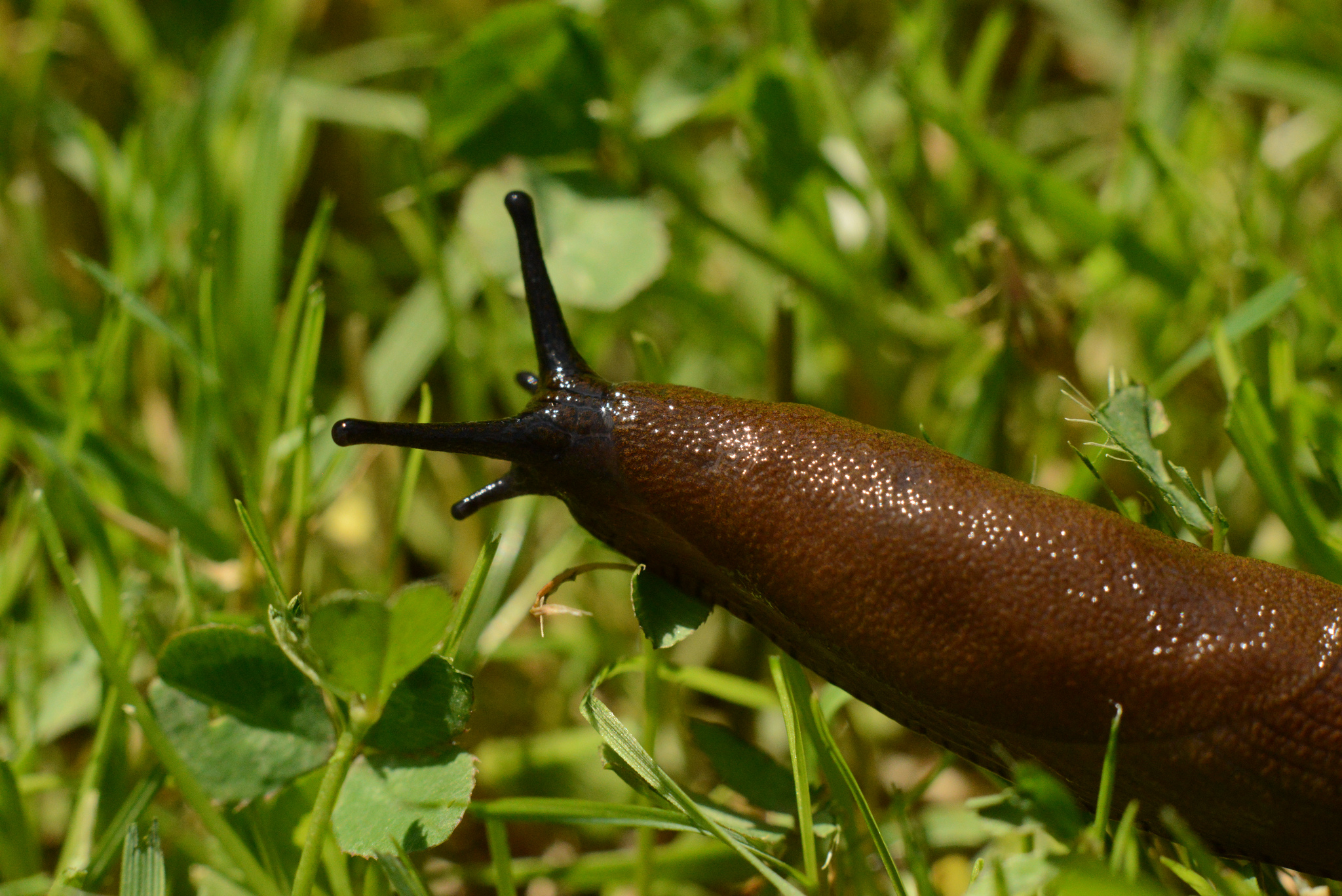 rote Nacktschnecke